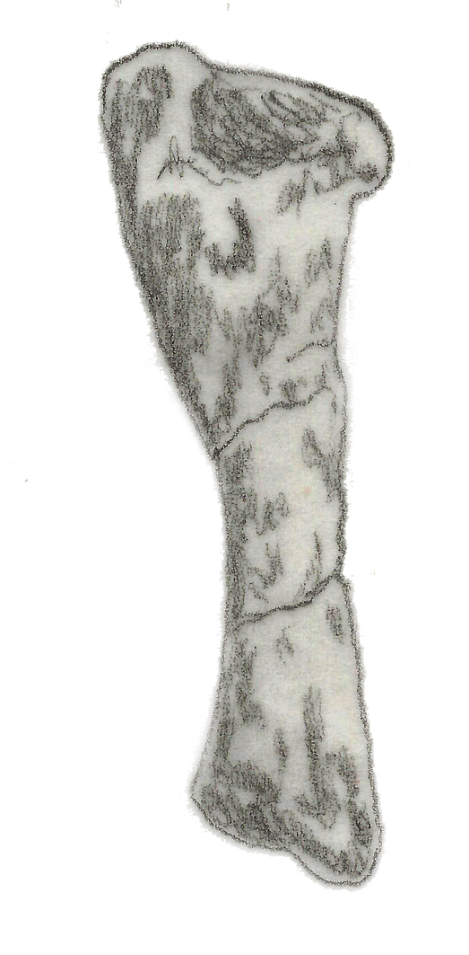 Illustration of a fossil of Eucnemesaurus